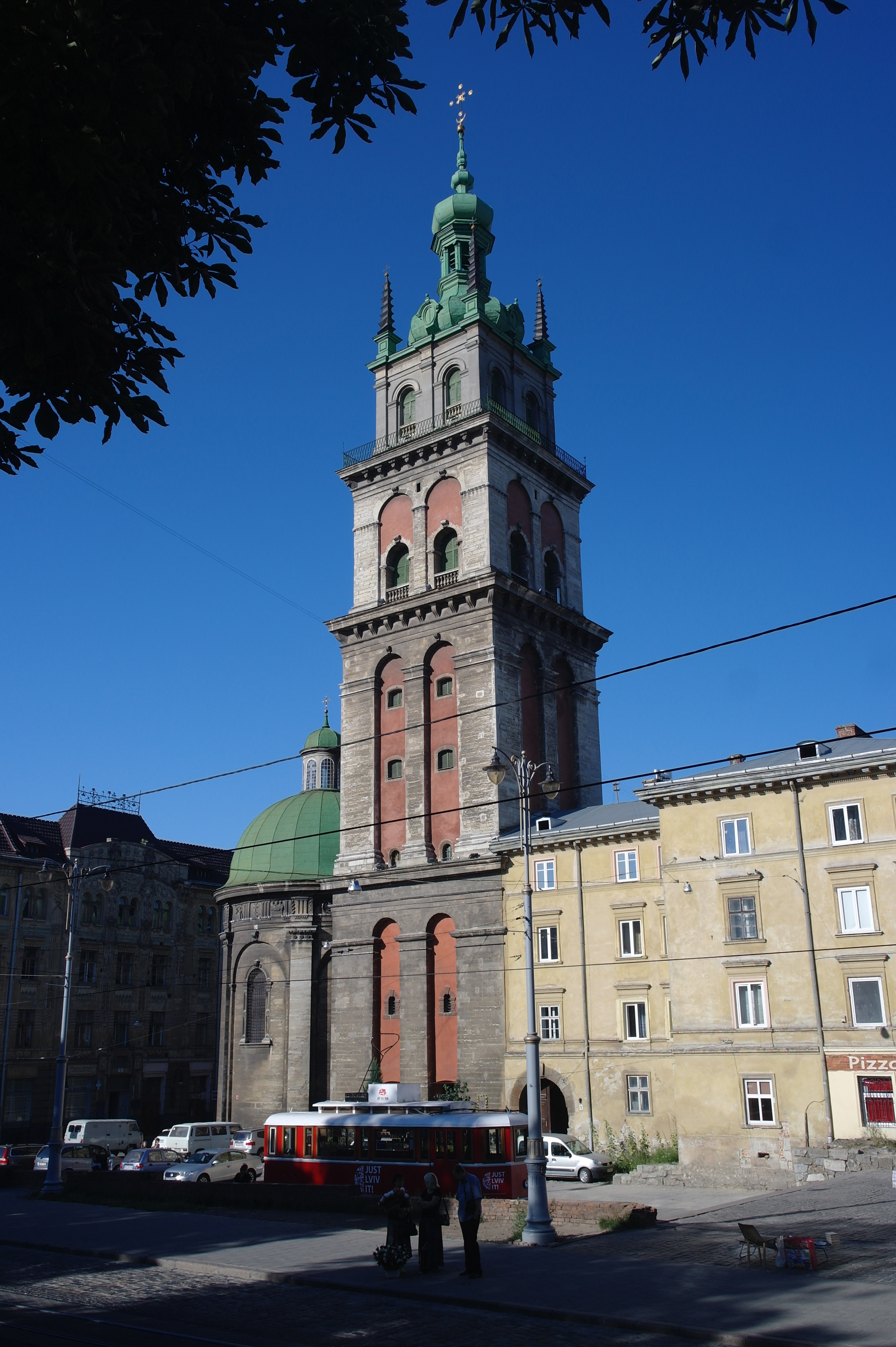 Львів, вежа Корнякта